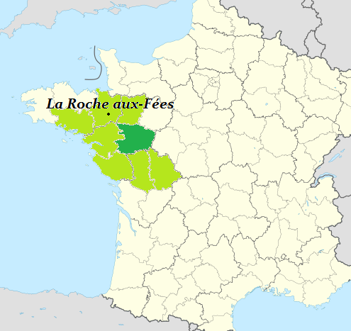 Zona d’origen i distribució dels dòlmens angevins. Verd fosc assenyala concentració (possible focus d’irradiació).